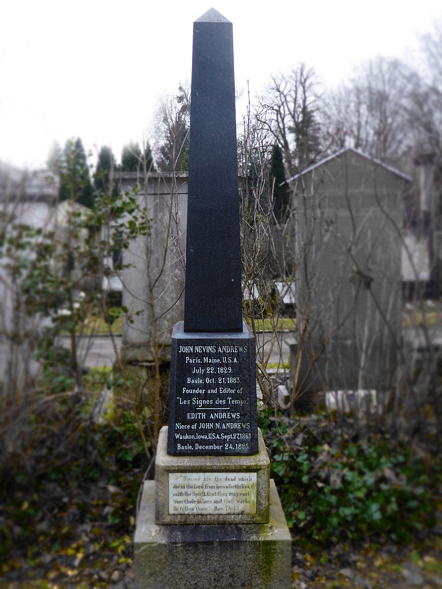 John Nevins Andrews (1829–1883), Prediger, Bibeltheologe, Verfasser von «History of the Sabbath», Missionar der Adventbotschaft in Basel. Edith Andrews (1863–1885), Grab auf dem Friedhof Wolfgottesacker, Basel